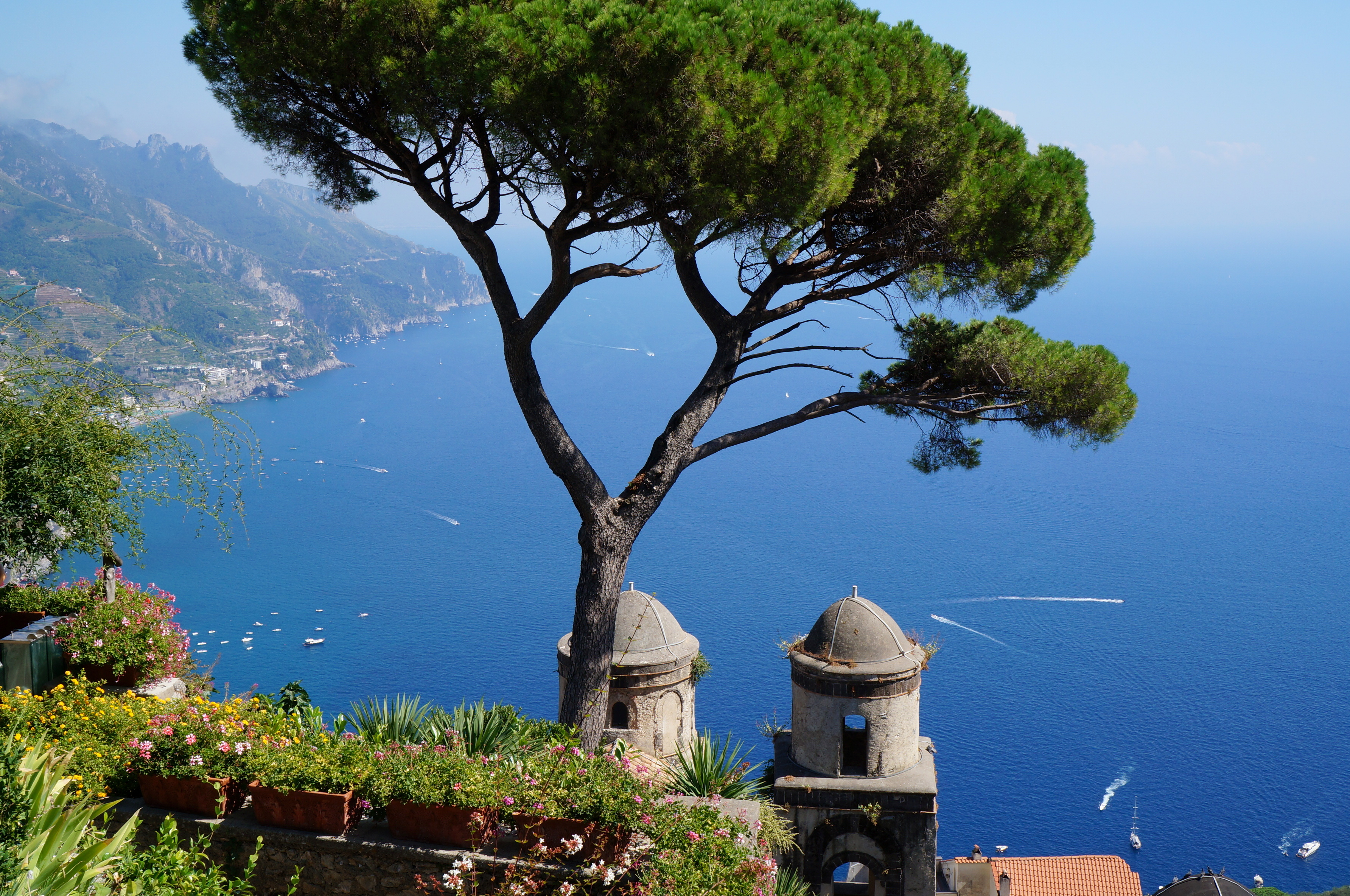 Ravello (SA), Italia.